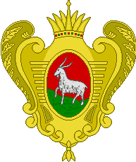 Герб для знамени Козловского гарнизонного полка